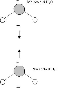 Forze di Van der Waals tra due molecole polarizzate (disegno efettuato con MS Office). L'autore dell'immagine ha effettuato l'upload e non ci sono problemi di copyright.